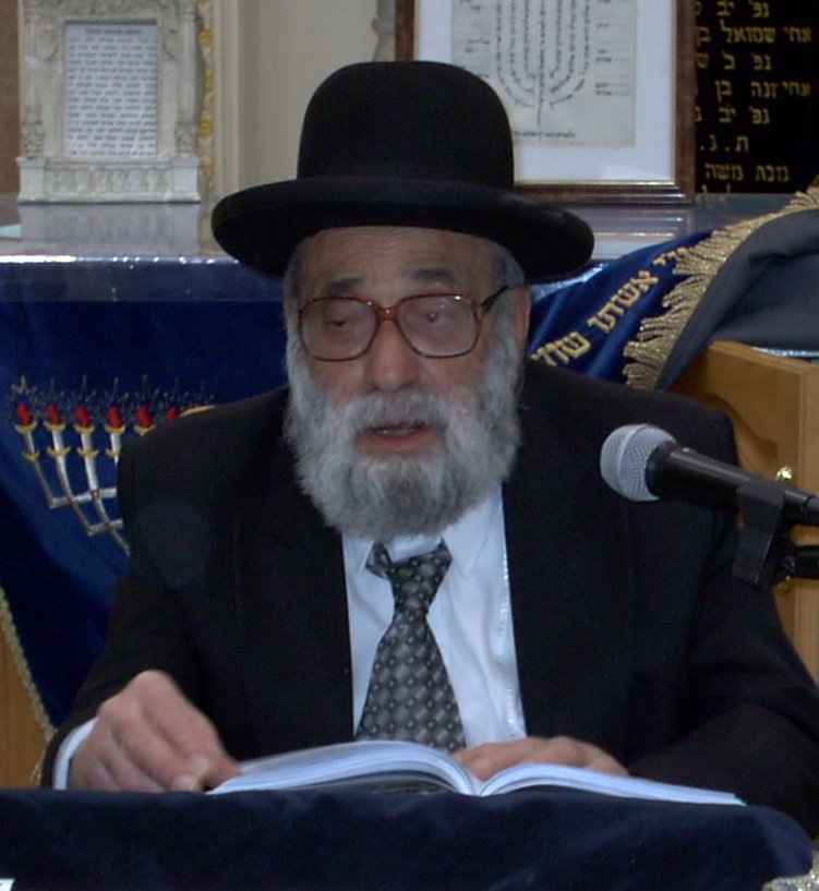 הרב יהודה מועלם בעת מסירת שיעור